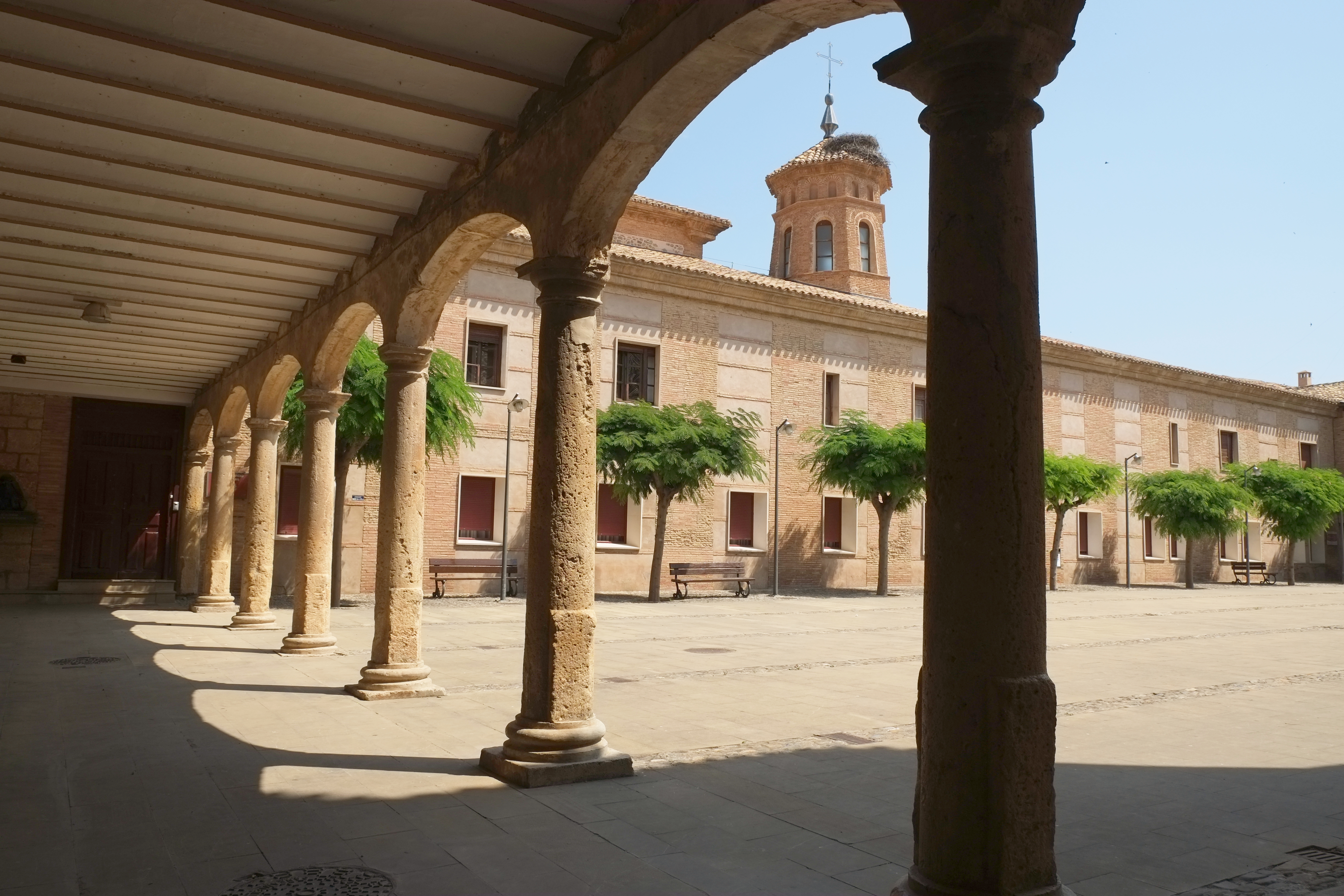 Kloster Santa María la Real in Fitero in Navarra (Spanien)